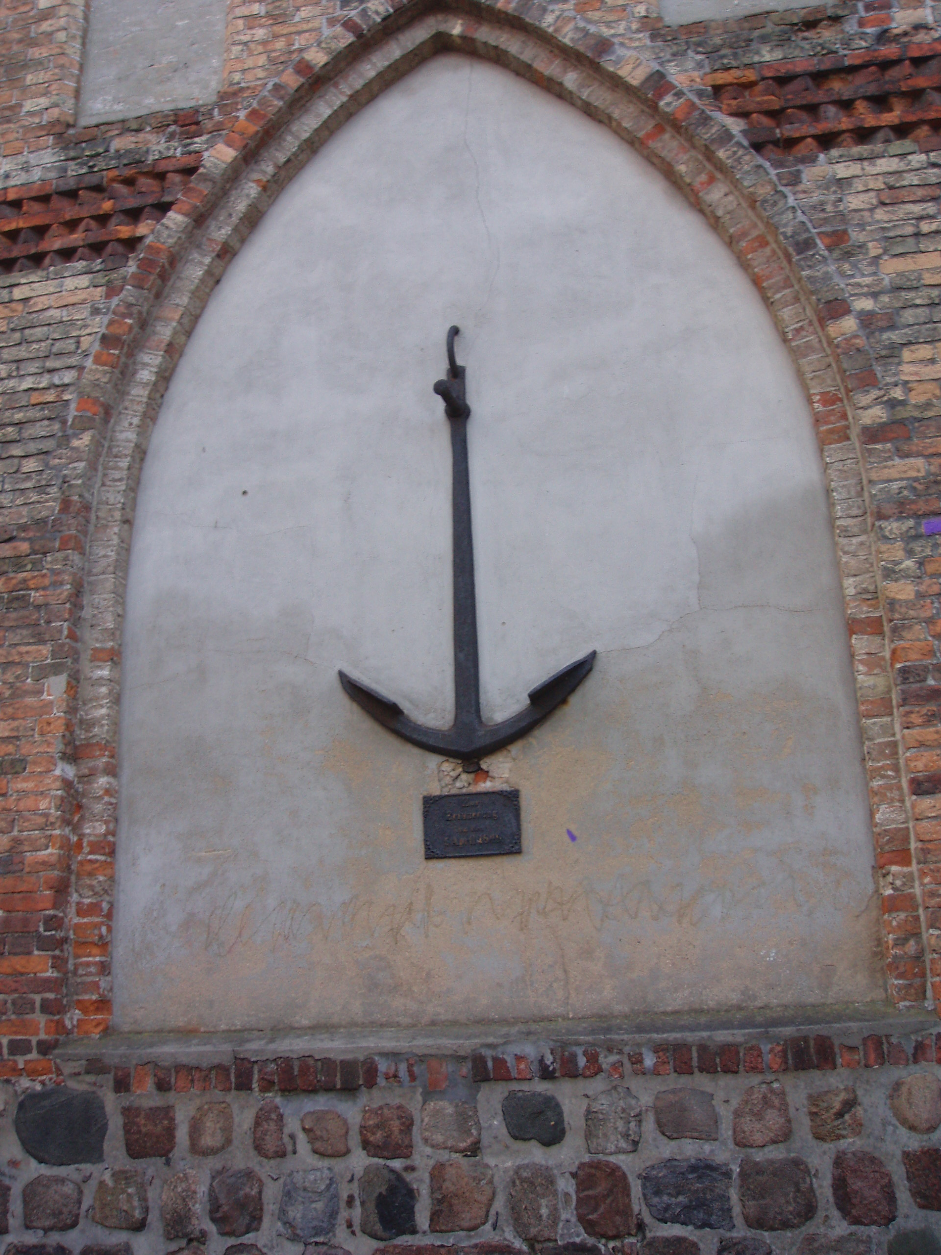 St. Nicolai, Eckernförde